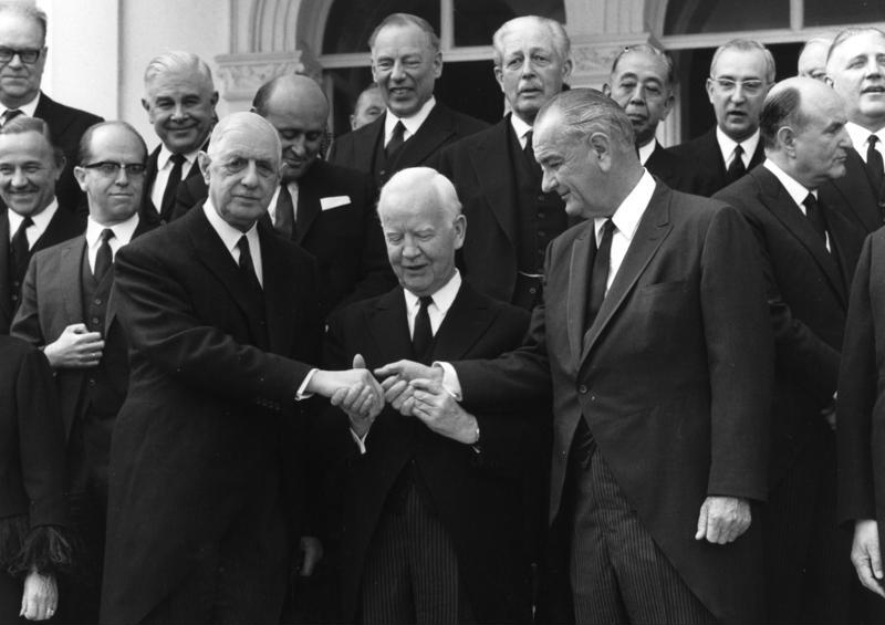 25.4.1967 Trauerfeierlichkeiten für Konrad Adenauer Empfang der Staats- und Regierungschefs in der Godesberger Redoute von rechts (1. Reihe): US-Präsident Lyndon B. Johnson, Bundespräsident Heinrich Lübke, Staatspräsident Charles de Gaulle